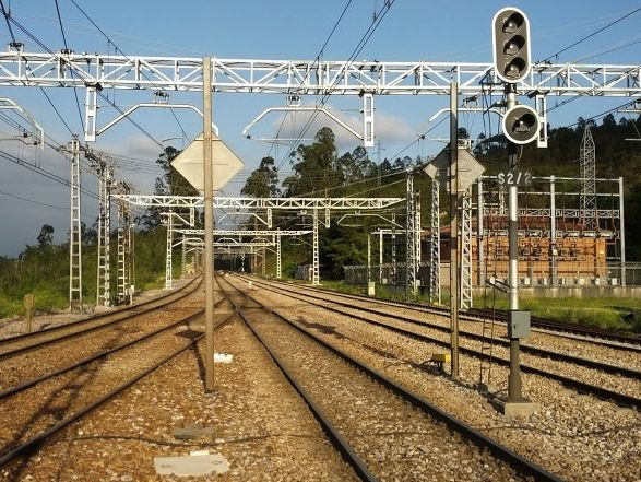 Punto de empalme de las líneas León-Gijón y Villabona-San Juan de Nieva en Villabona